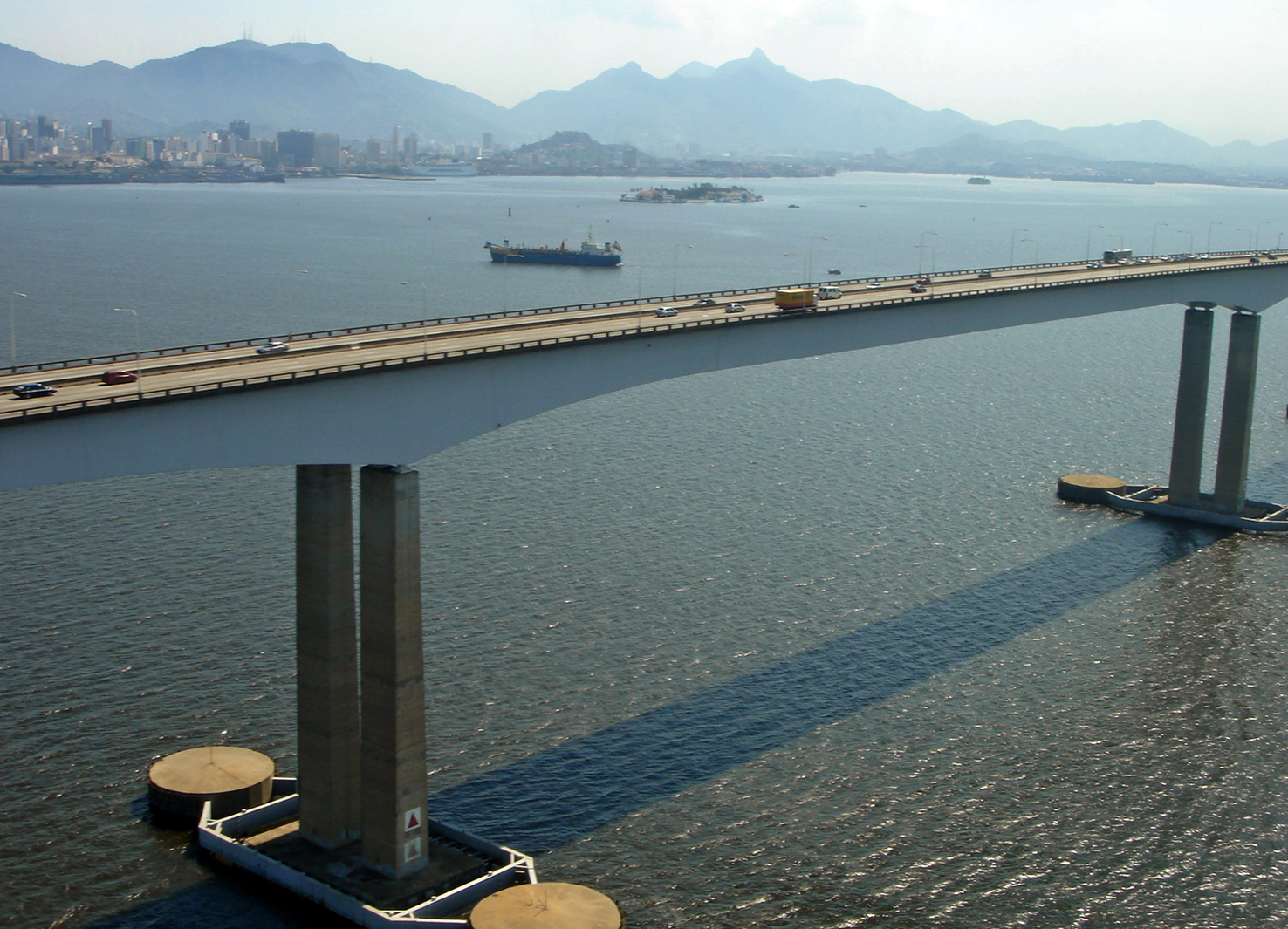 Ponte Rio-Niteroi